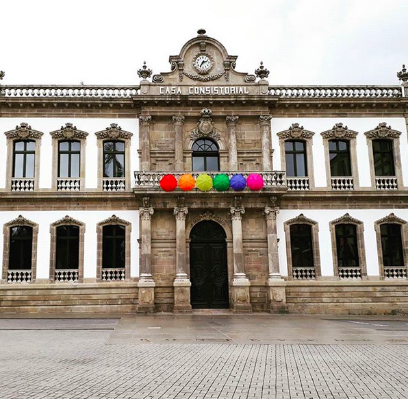 Fotografía do edificio principal do Concello de Pontevedra engalanado coas cores da bandeira LGTBI co gallo do 28 de xuño